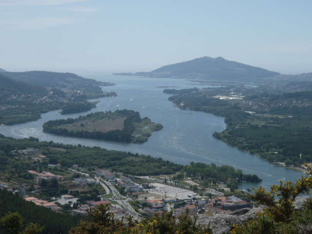 O Rio Minho, fronteira natural com as formações naturais até à foz. Em destaque a Ilha da Boega, e em segundo plano, mais pequena, a Ilha dos Amores.